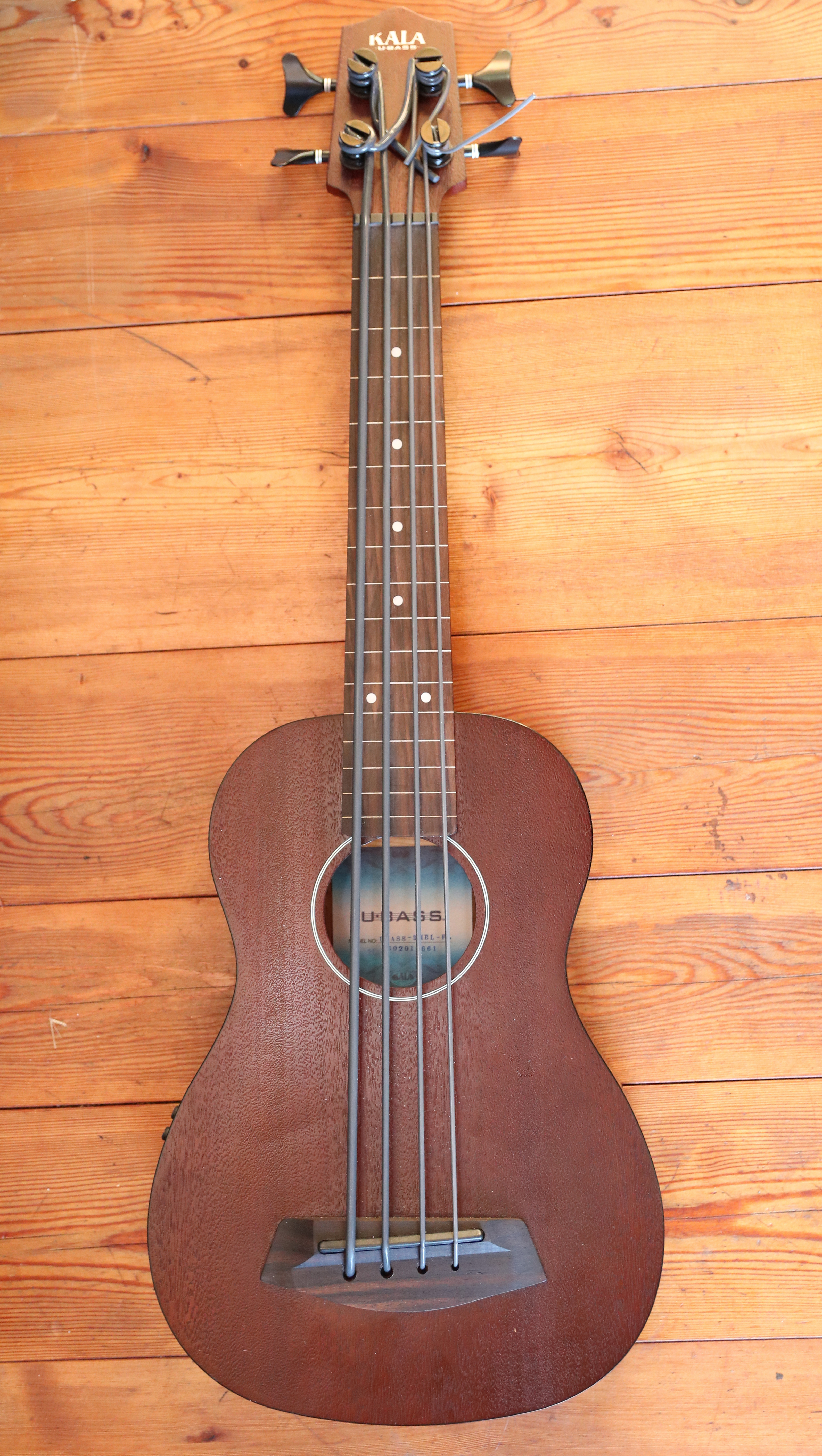 Bass Ukulele, Hersteller Kala, Modell UBASS-RMBL-FL, Bj. 2016